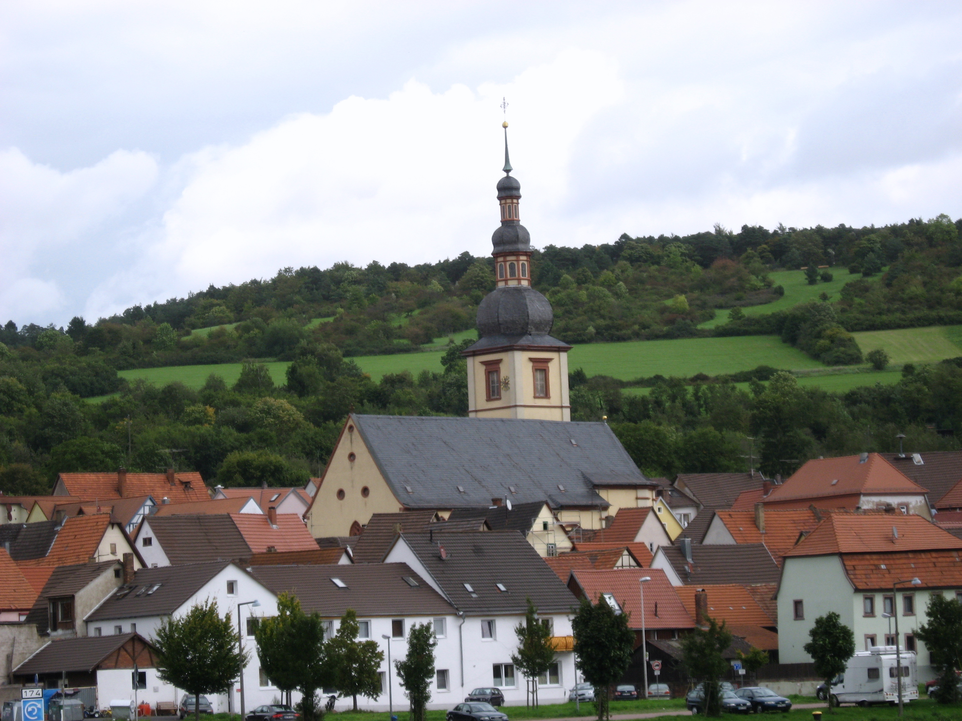 Pfarrkirche St. Jakobus der Ältere in Lengfurt, geweiht am 7. September 1614